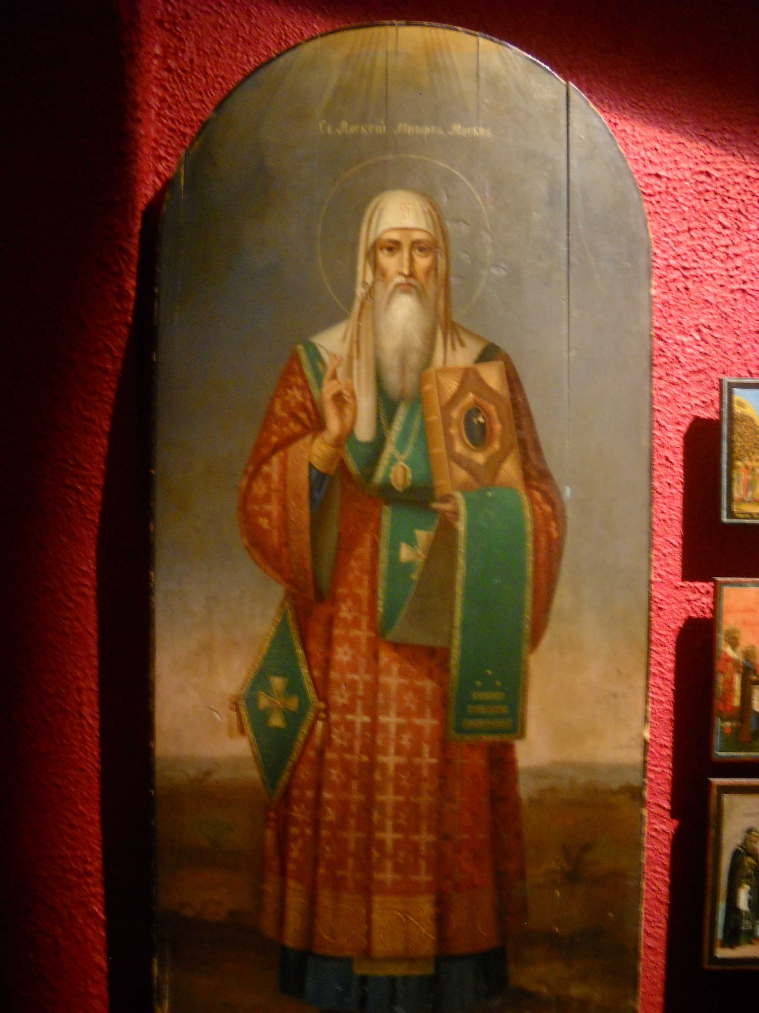 Św. Aleksy metropolita kijowski, muzeum w Supraślu